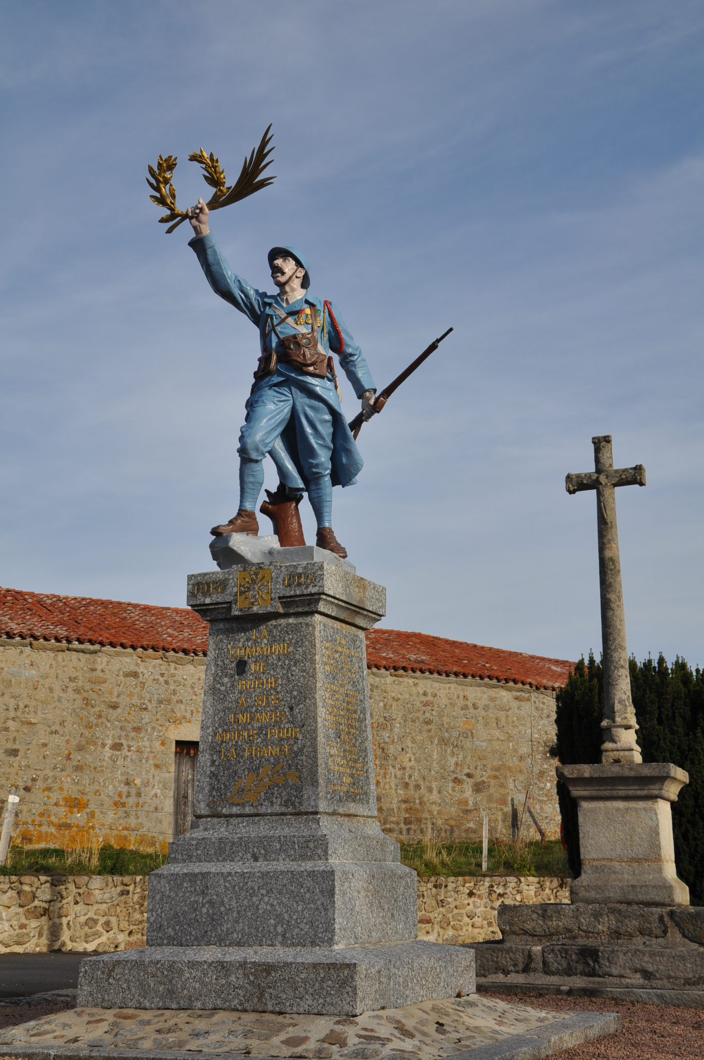 ROCHE